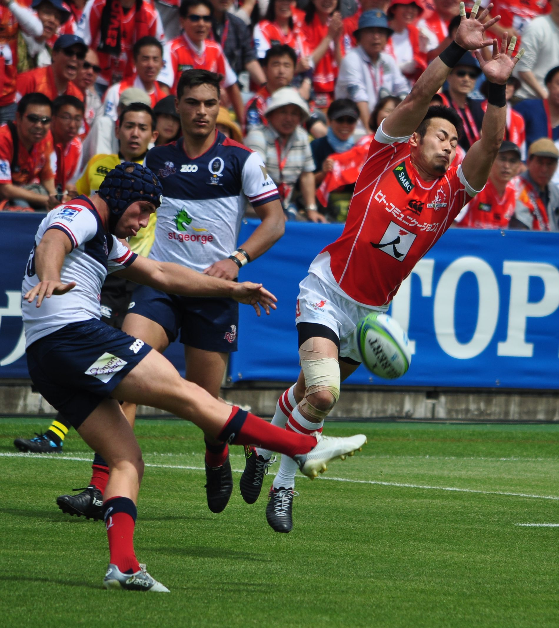 サンウルブズ vs レッズ戦